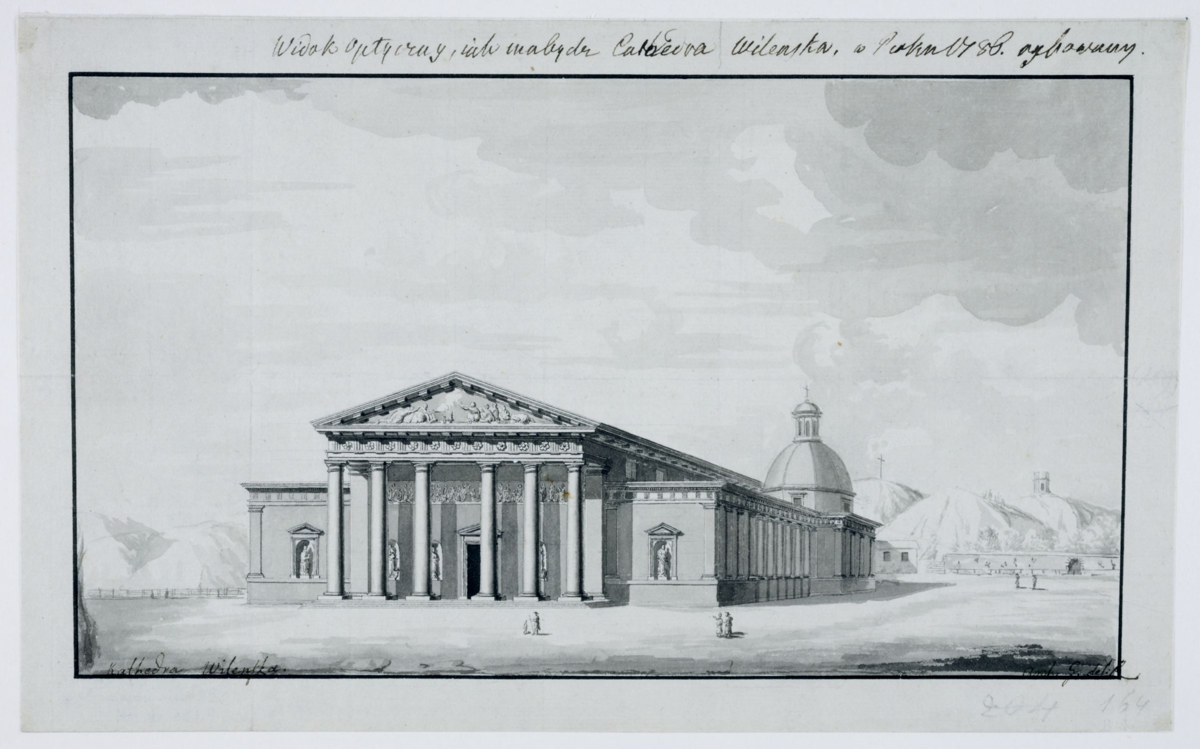 Беларуская (тарашкевіца): Вільня (Vilnia), плян Катэдральны (plac Katedralny). Катэдра (Katedra)